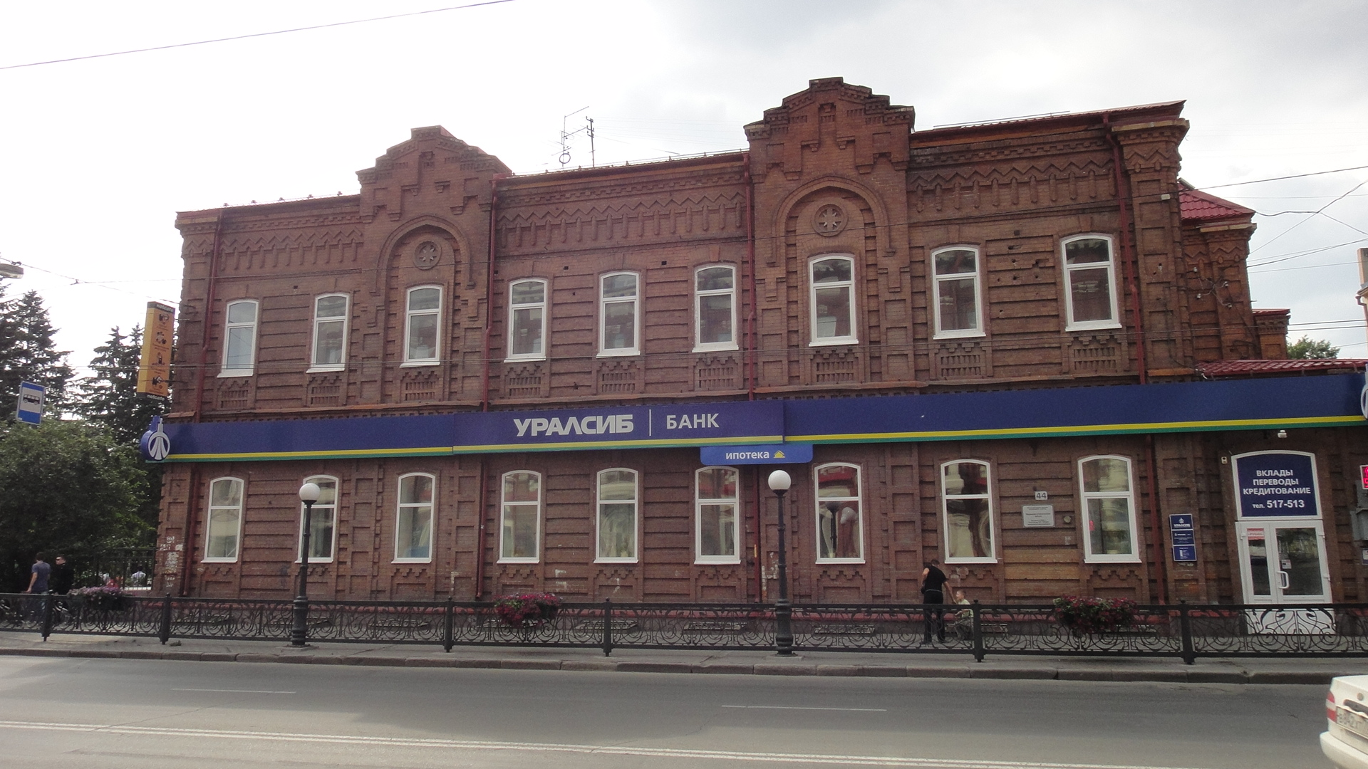 дом 44 по проспекту Ленина в г. Томск выстроен по проекту архитектора В.В.Хабарова в 1896 году.